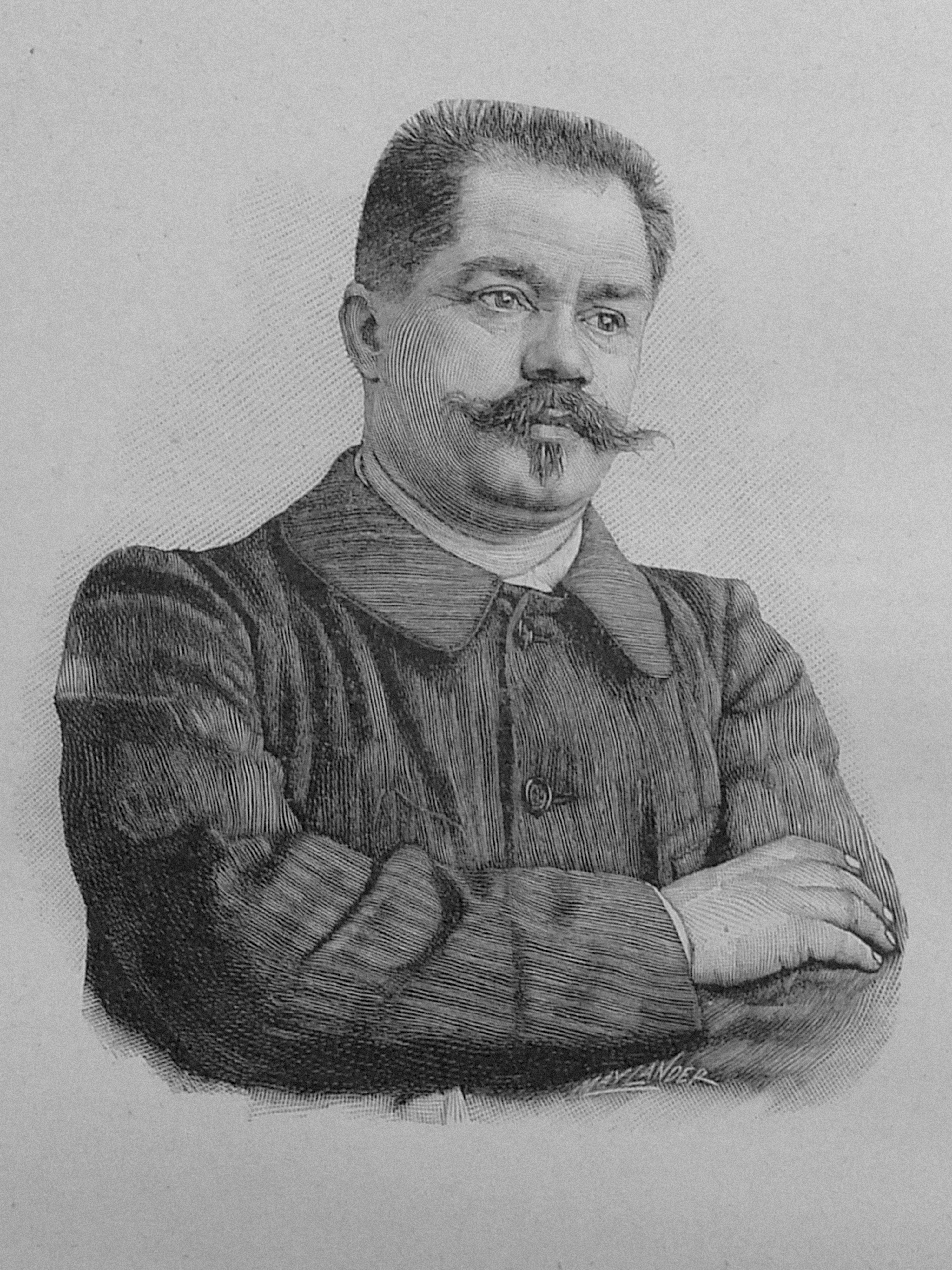 Lucien Descaves, gravure d'après photo dans Figures contemporaines Album Mariani tome XI, 1908. graveur Charles Maylander.